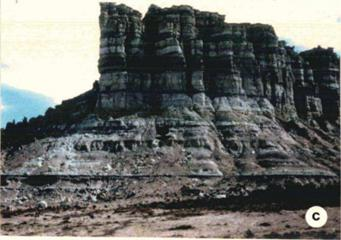 Litologías de la Formación Baqueró aflorantes en el Macizo del Deseado, Santa Cruz.